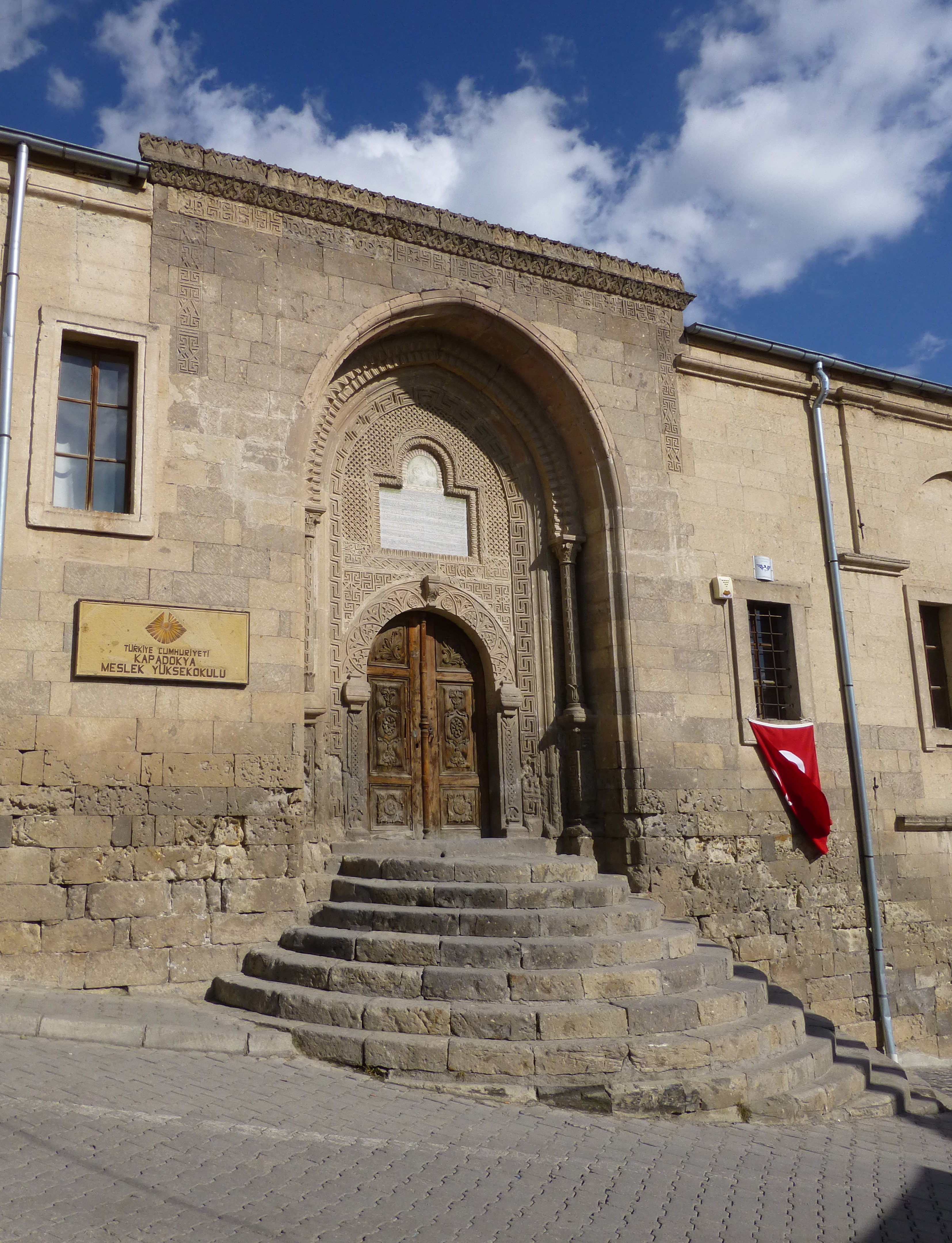 Façade de l'ancienne medersa Şakir Mehmet Paşa de Mustafapaşa (district d'Ürgüp, province de Nevşehir, Turquie), qui abrite aujourd'hui les locaux d'une école professionnelle.